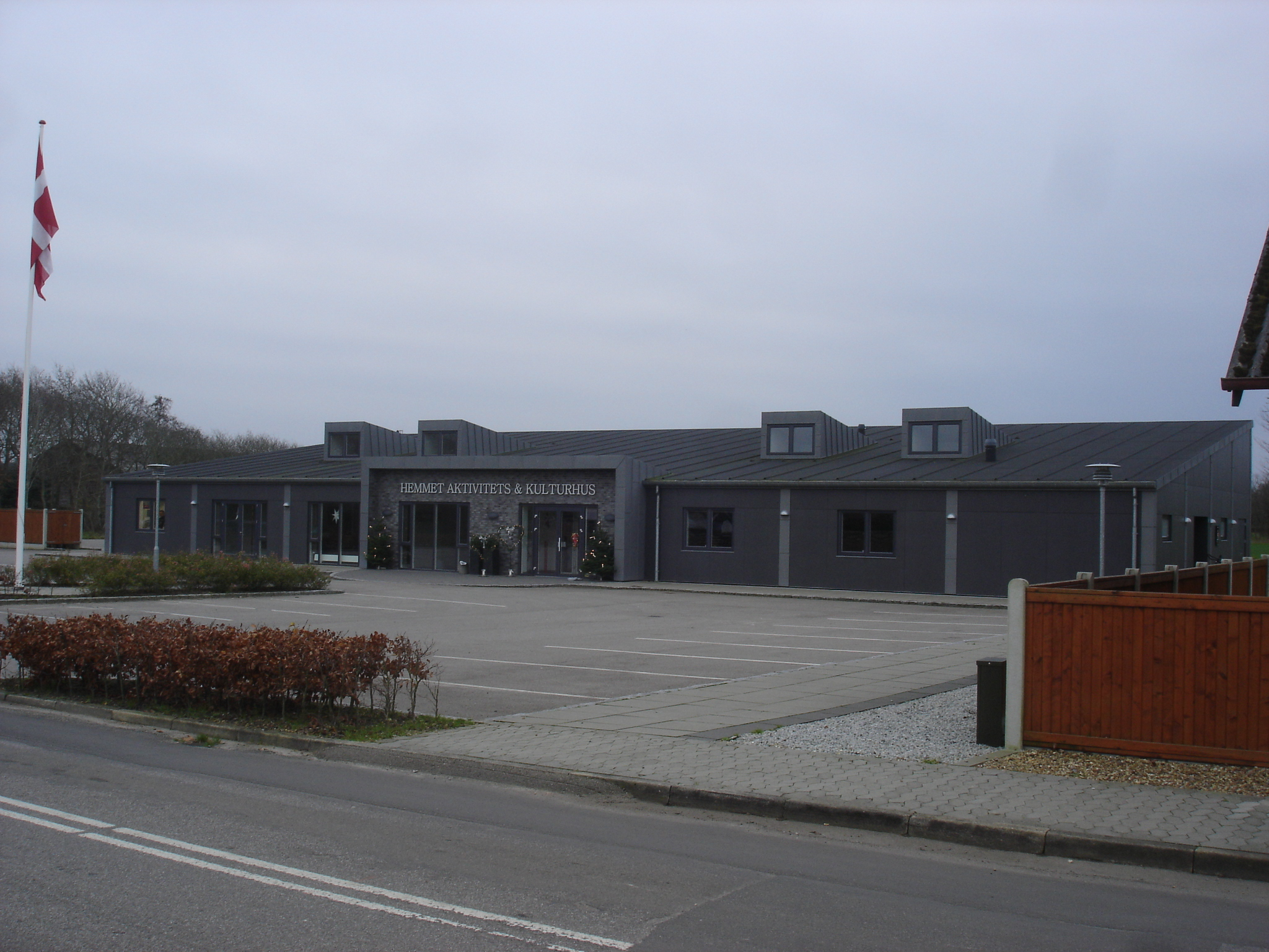 Hemmet Aktivitets- & Kulturhus